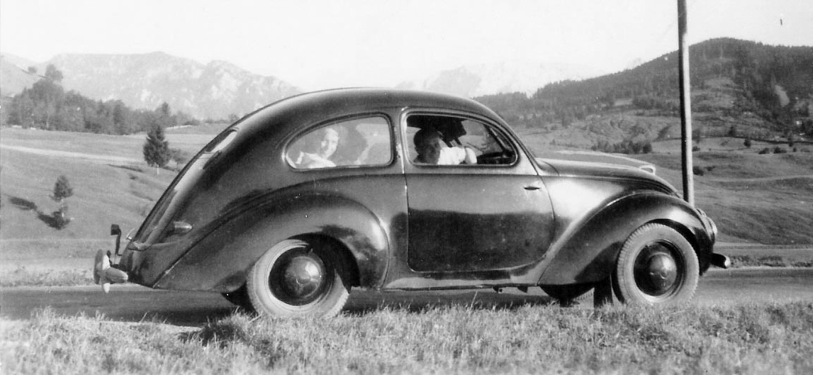 Hanomag 1,3 Liter, Limousine Baujahr 1939